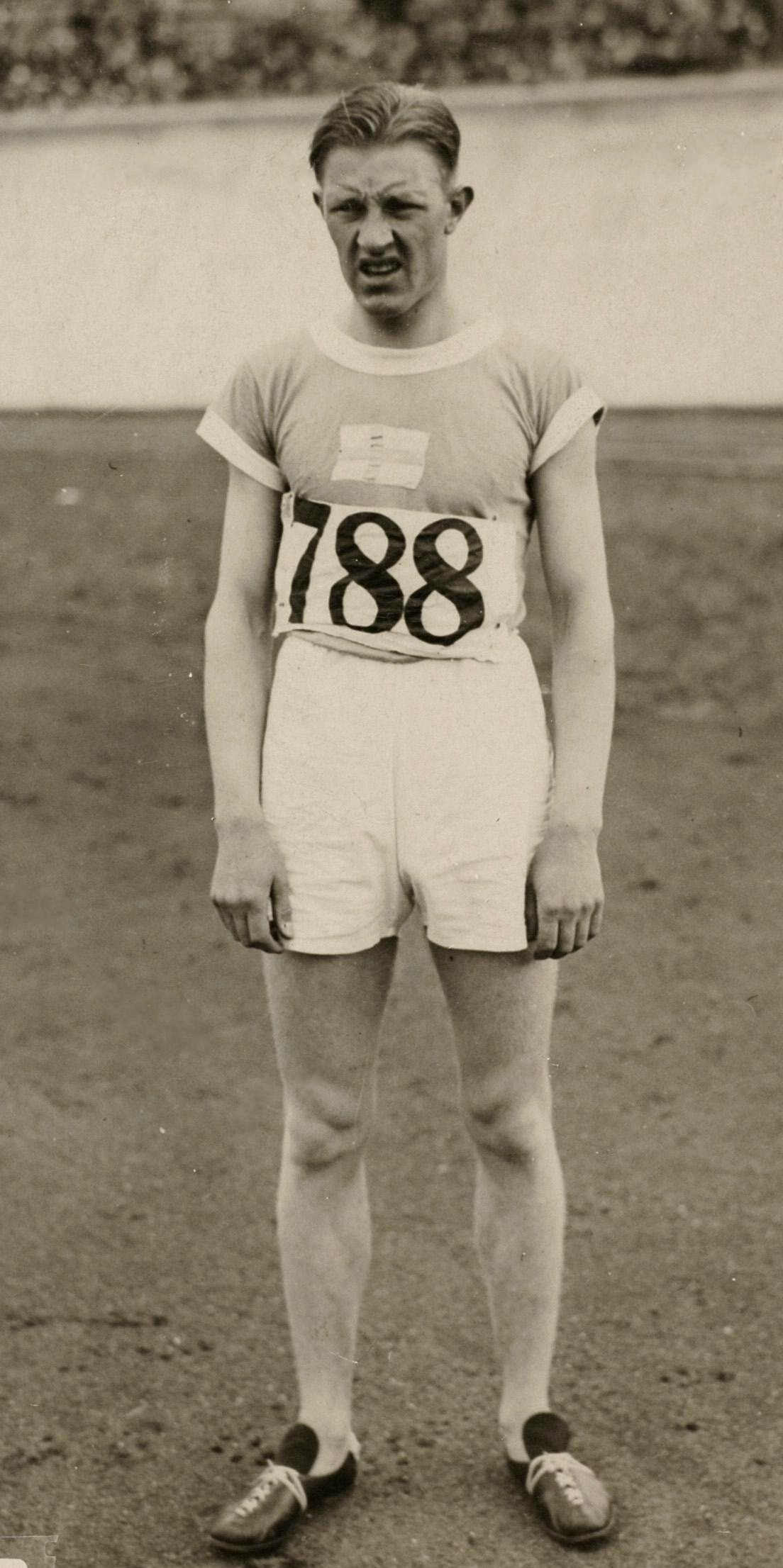 Sport. Olympische Spelen 1928 Amsterdam, Nederland : De Fin Harri Larva, olympisch kampioen op de 1500 m hardlopen.